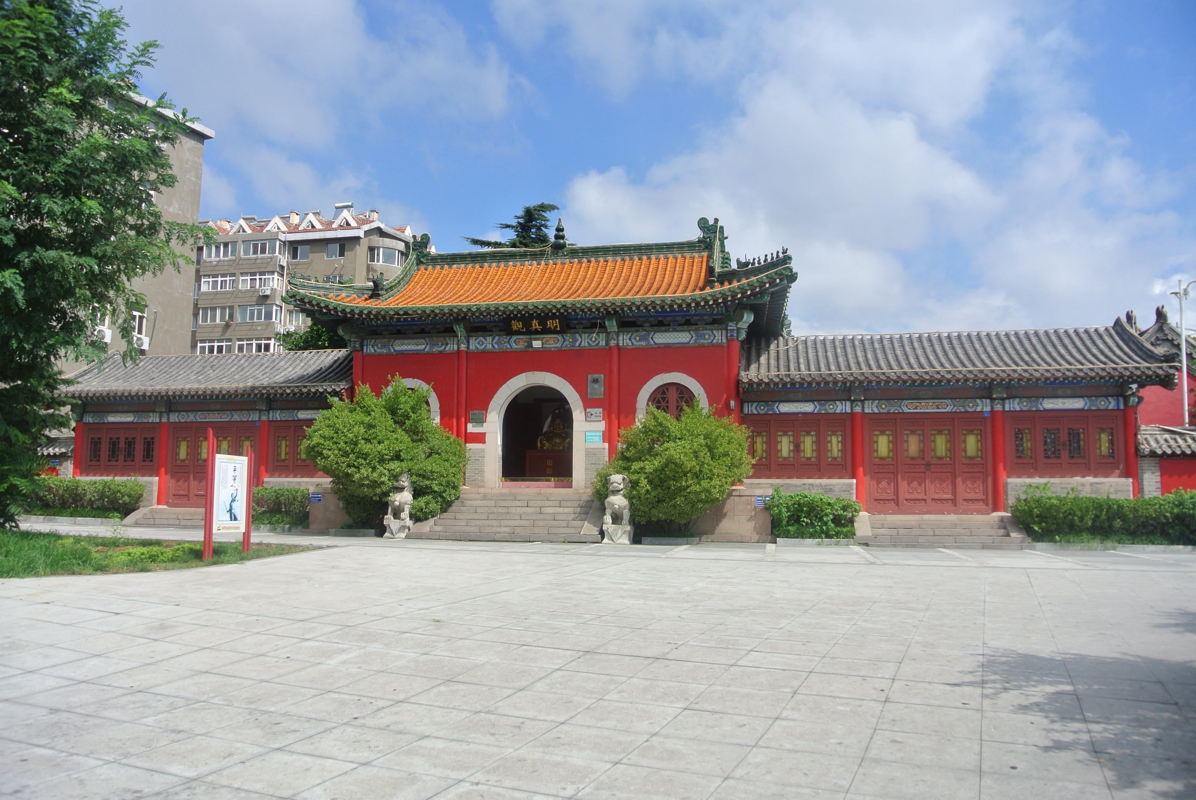 青岛明真观山门